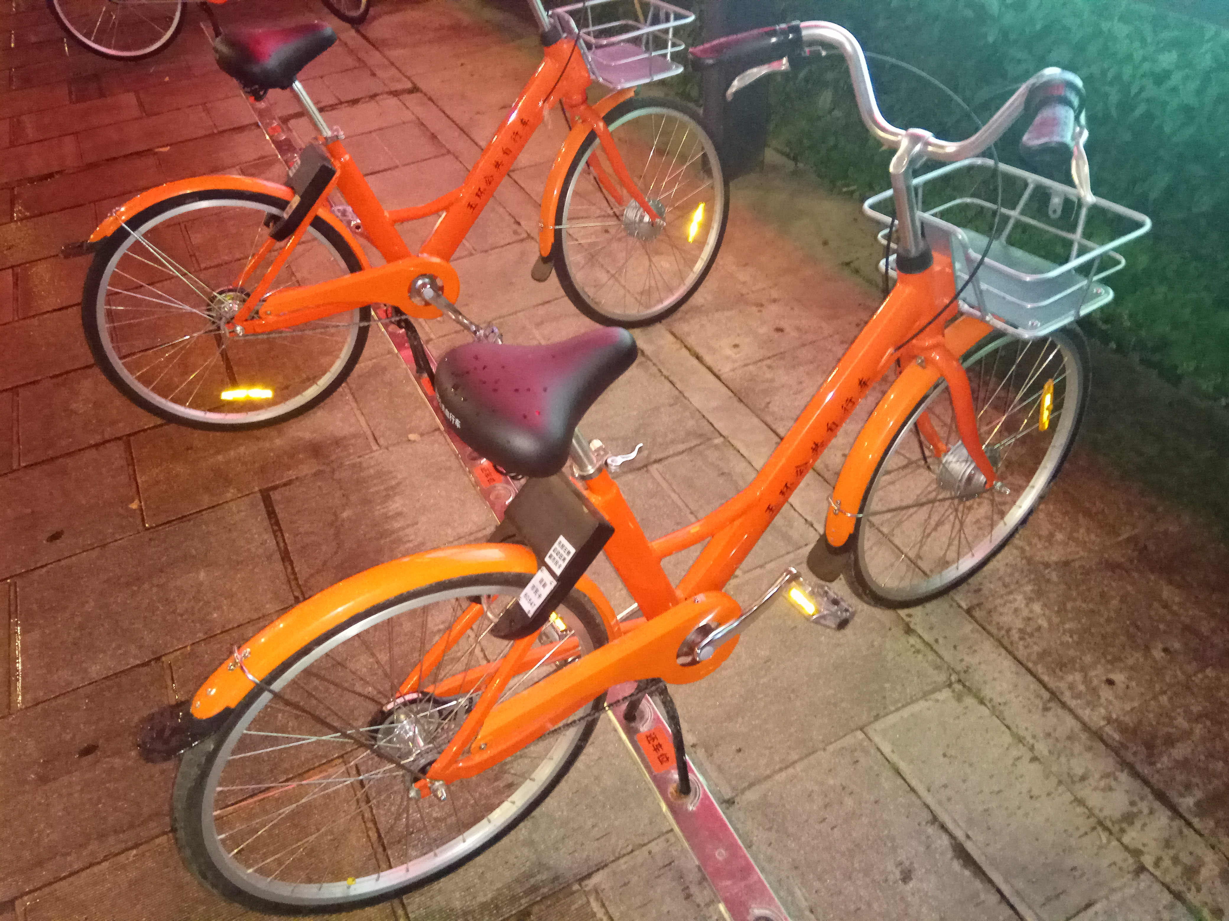 中文（中国大陆）: 玉环公共自行车系统